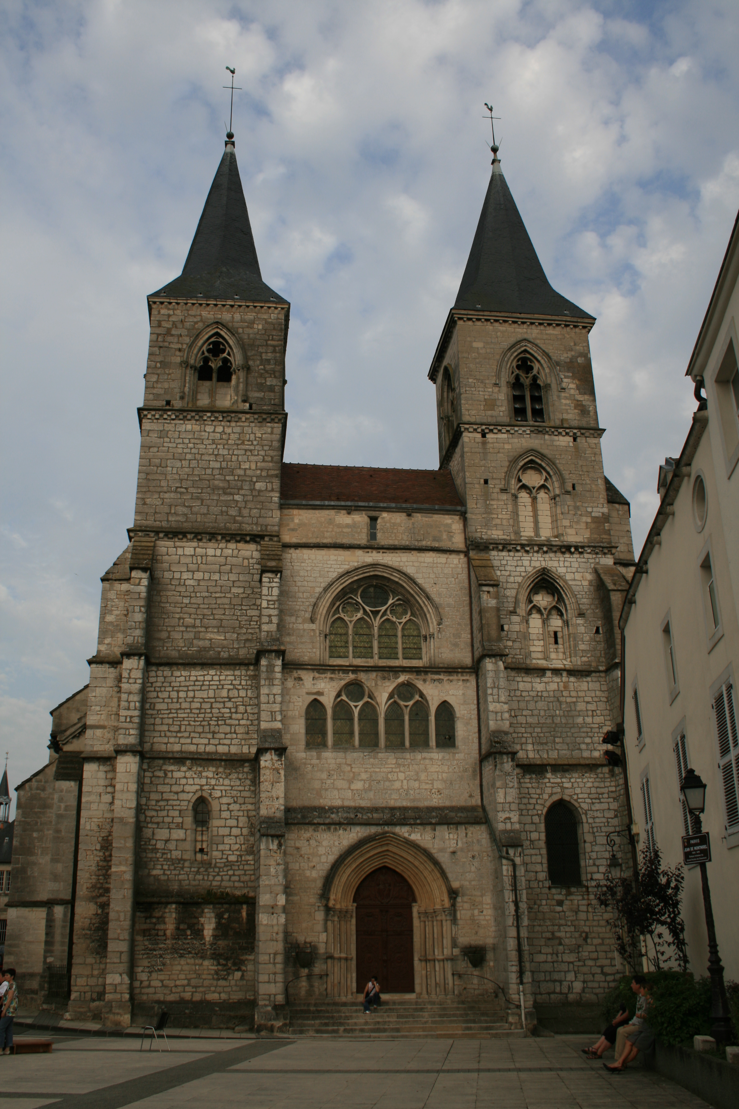 Chaumont (Haute-Marne) Basilique Saint Jean Baptiste